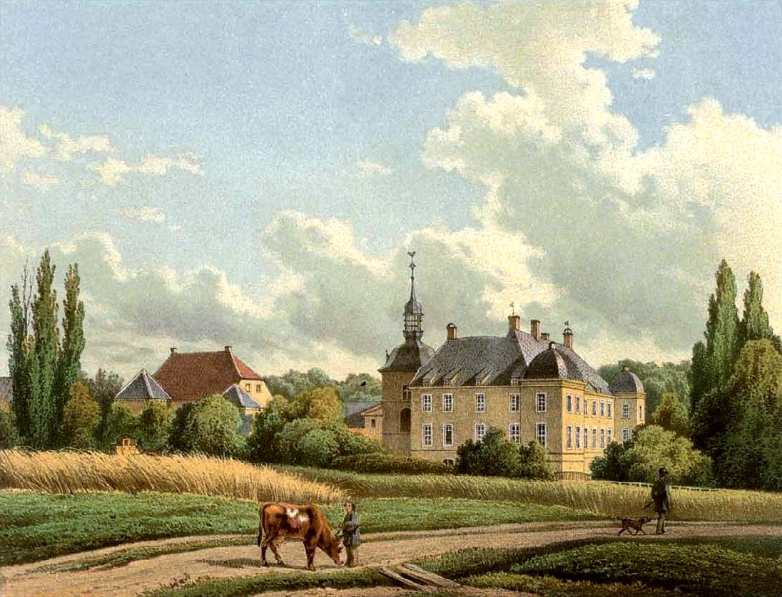 Schloss Velen, Lithografie aus dem 19. Jahrhundert